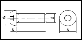 ISO 7380